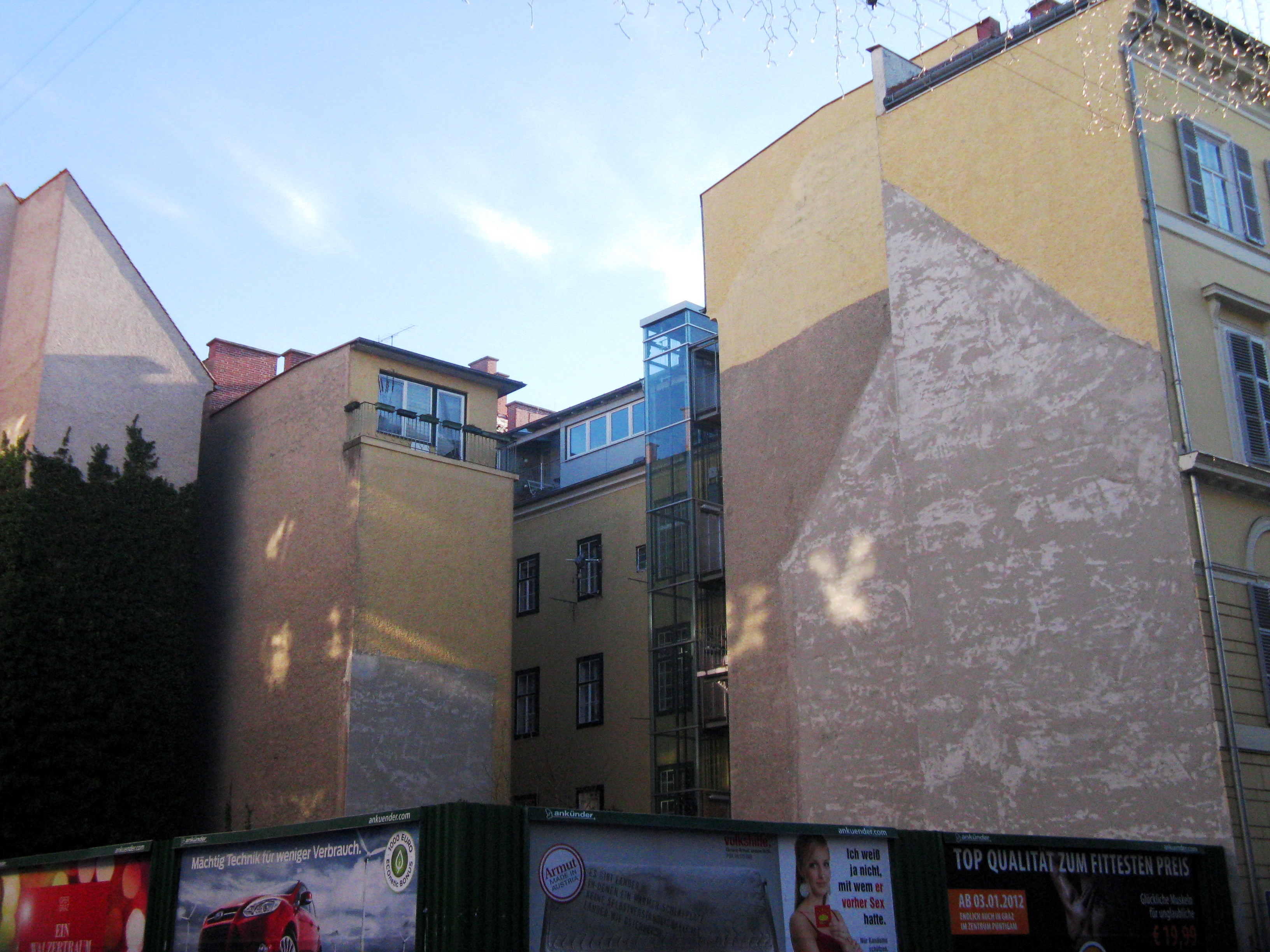 Die Abrissstelle des Kommod-Hauses an der Ecke Einspinnergasse/Burggasse. Die Silhouette ist noch eindeutig erkennbar.